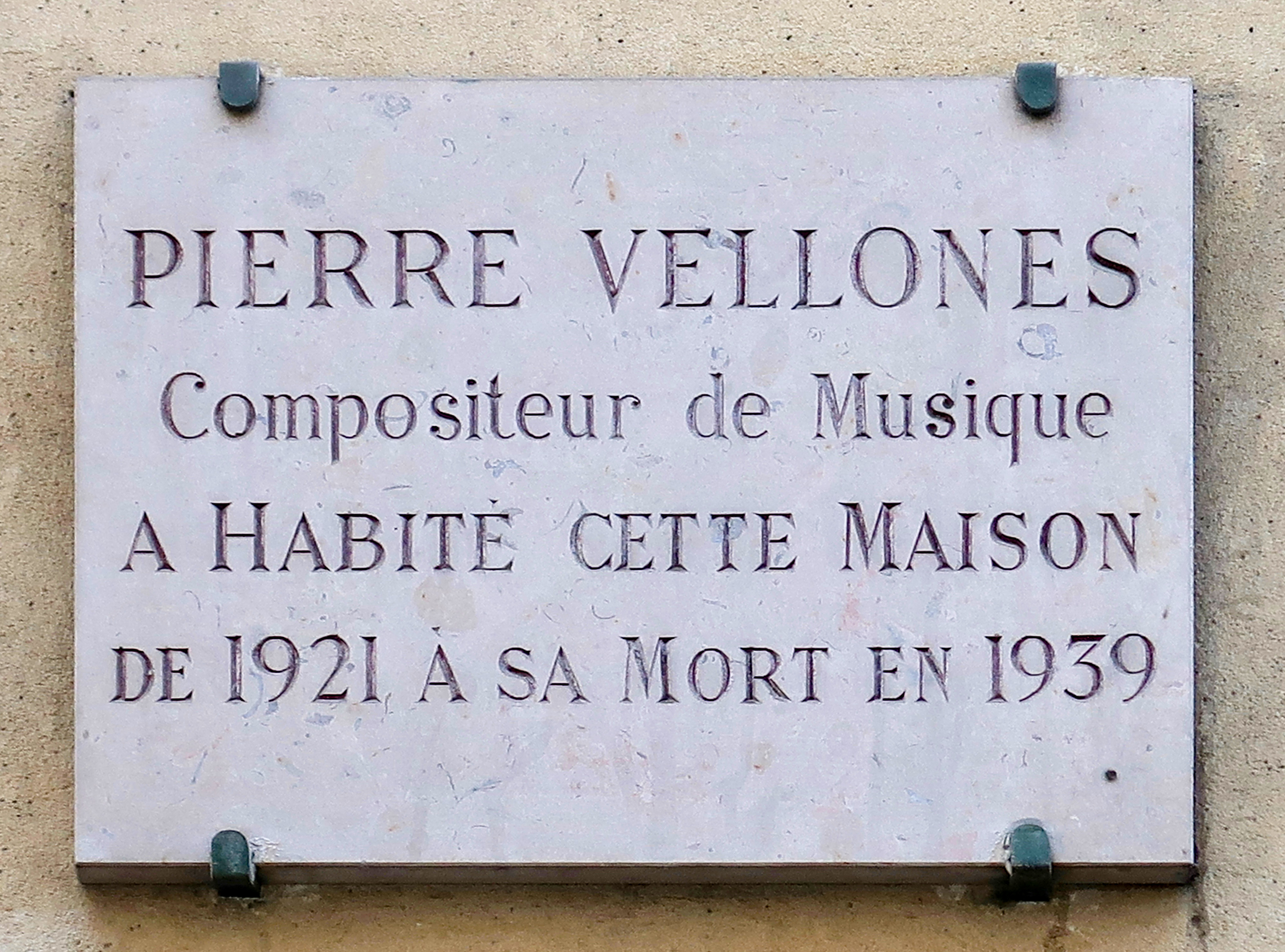 Plaque en hommage à Pierre Vellones, 10 rue Huysmans (Paris, 6e).